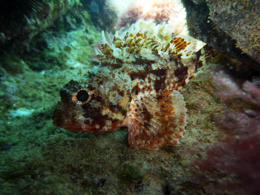 scorpaena notata en El Portús (Cartagena, Spain).